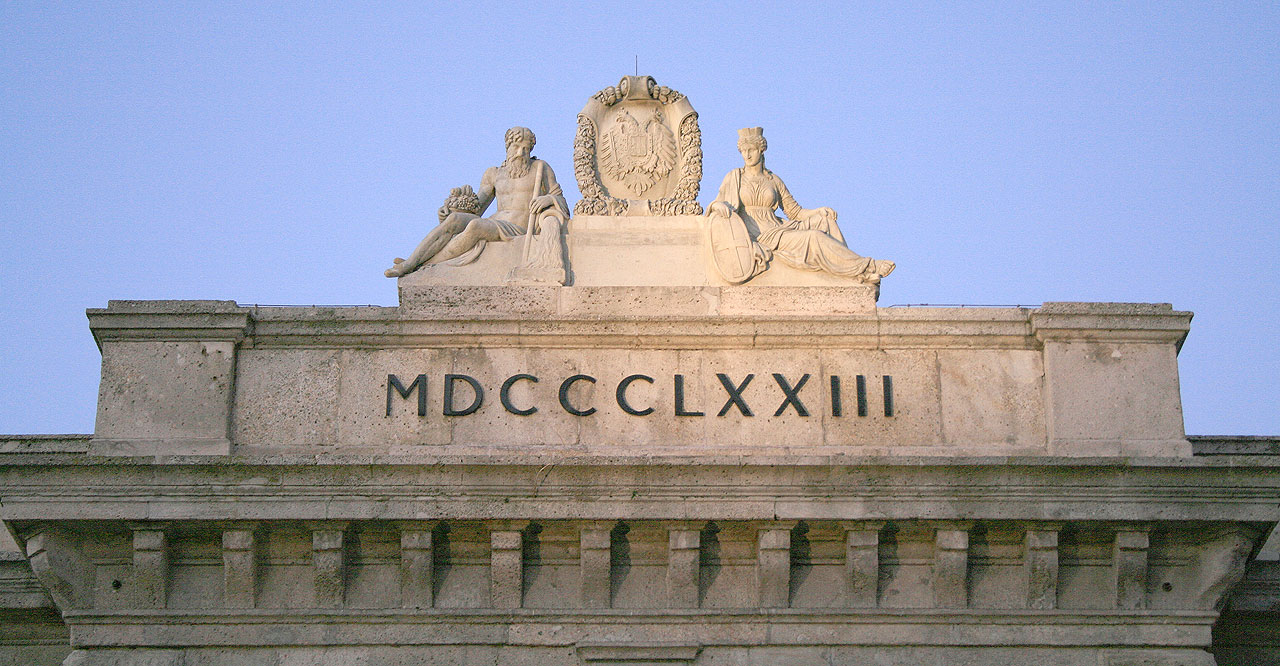 Detail der Alten Schieberkammer (errichtet 1873) des ehemaligen Wasserreservoirs auf der Schmelz, im XV. Bezirk in Wien / Detail of the Alte Schieberkammer (old mid-gate chamber, built 1973) of the former sweetwater-reservoir in the 15th district of Vienna